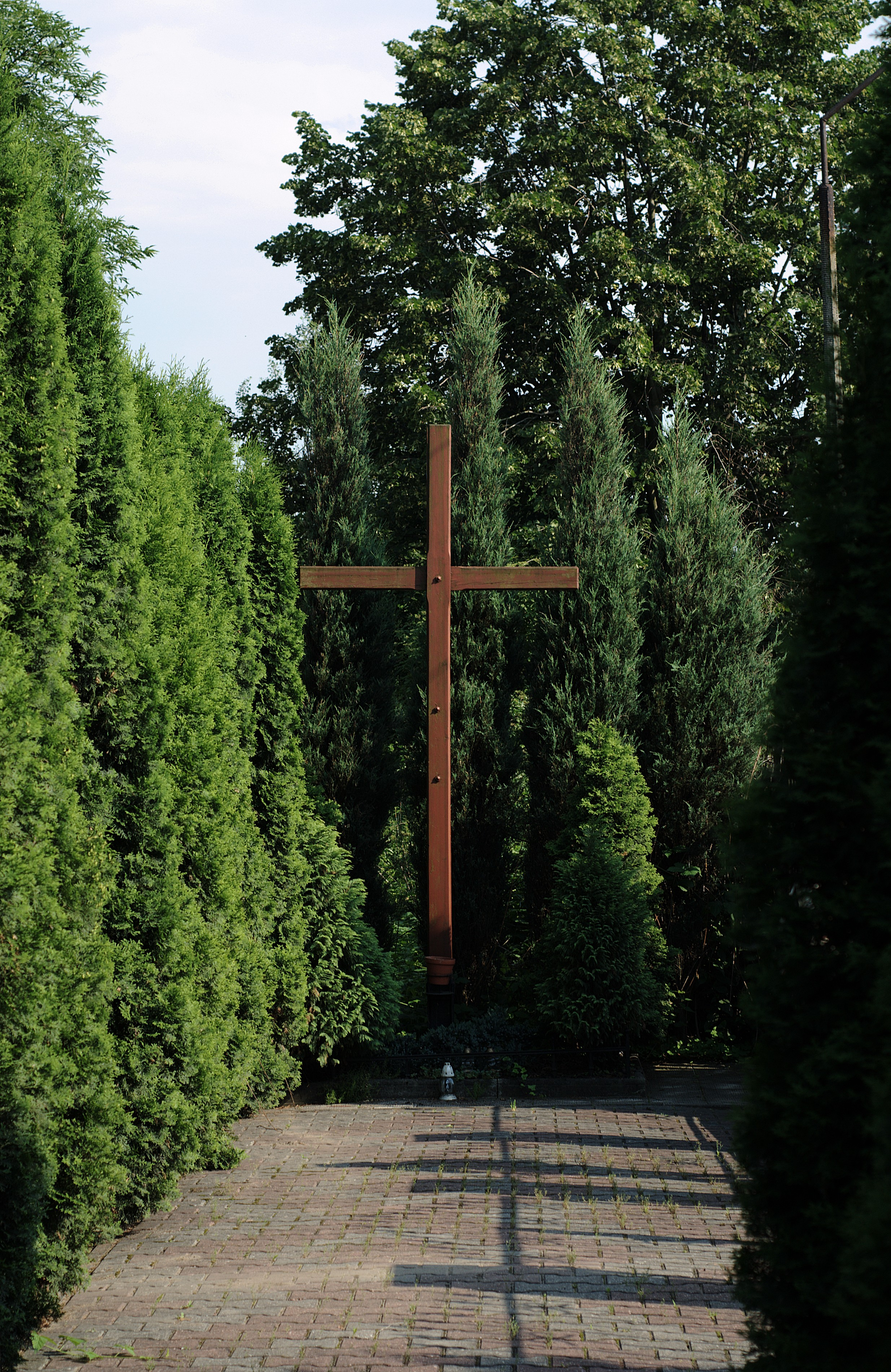 Toszek. Mogiła zbiorowa ofiar obozu NKWD.